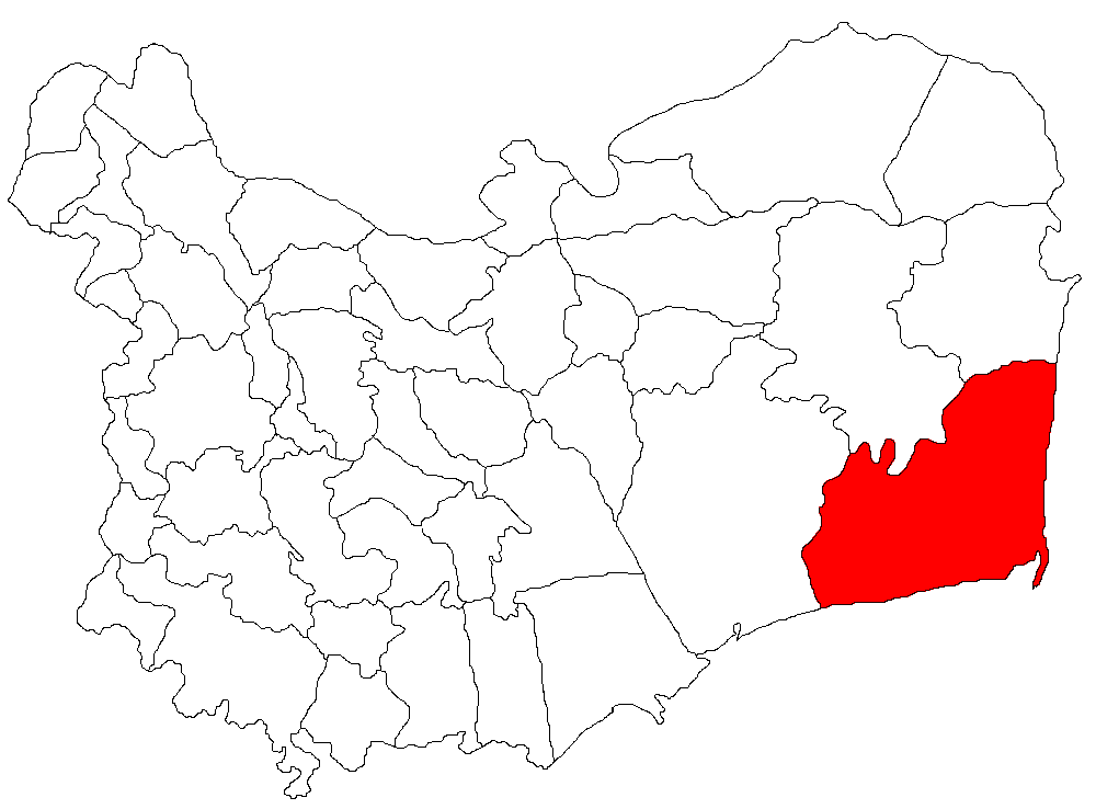 Categorie:Hărţi ale judeţului Tulcea